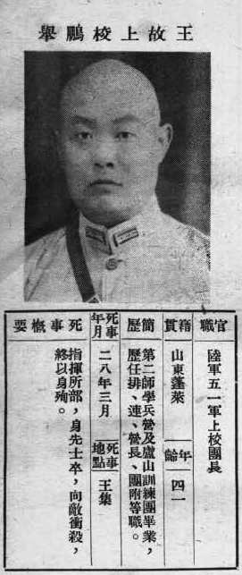 中文（台灣）: 抗戰軍人忠烈錄第一輯中的烈士遺像